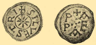 Pečeť Silvestra II.